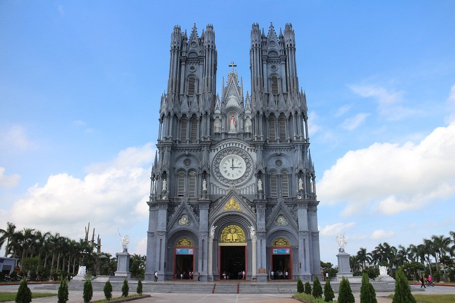 Hình ảnh nhà thờ